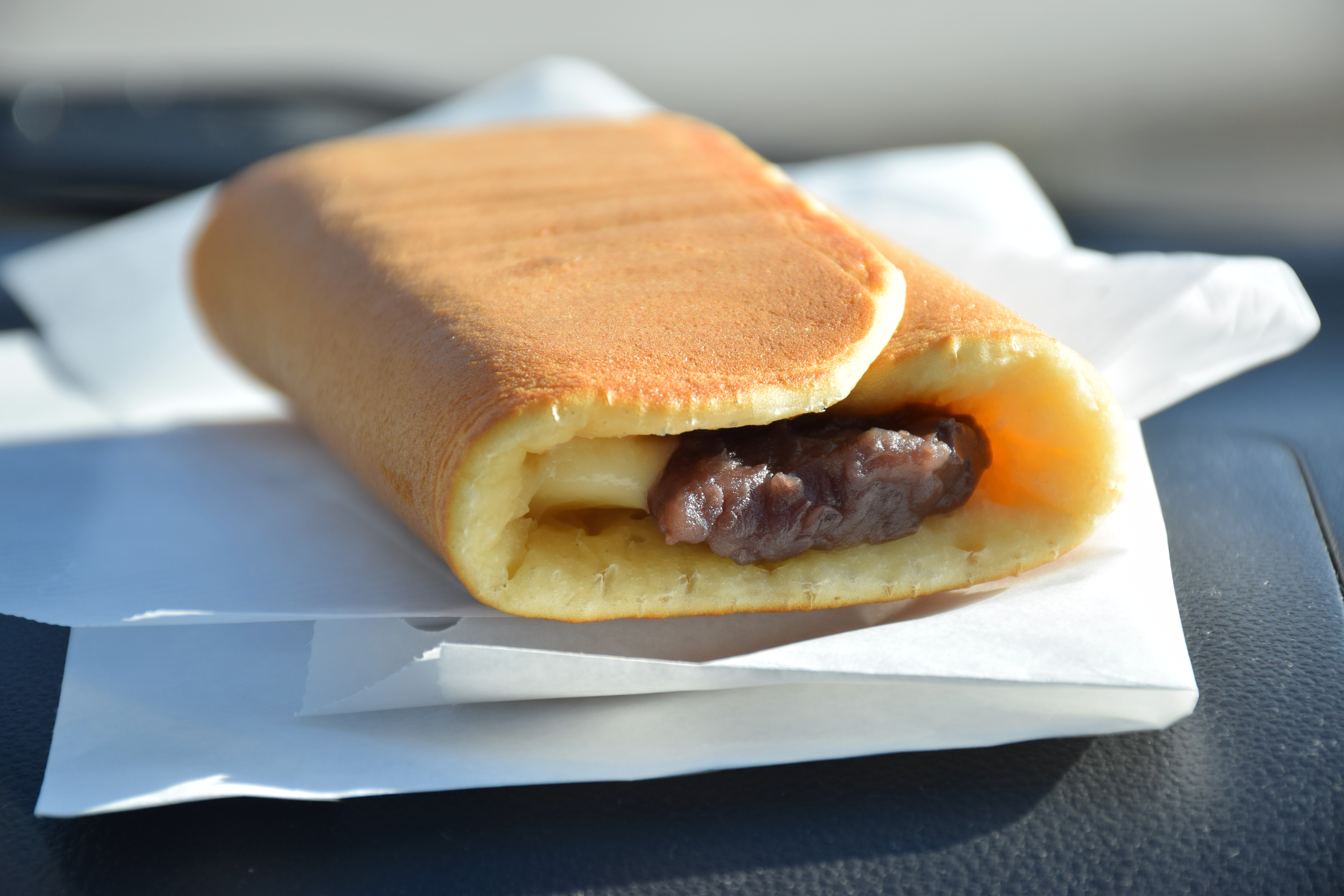 大あんまき（チーズ）